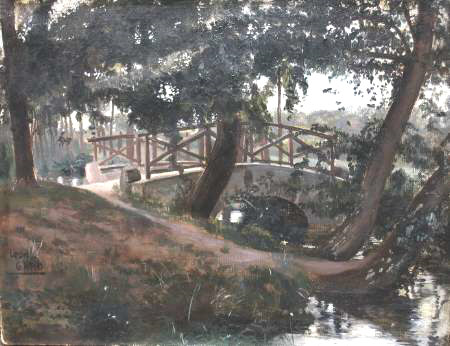 Photo d'un tableau ("Le Petit pont de pierre", par léon Gard) dont je suis le propriétaire et l'ayant droit.